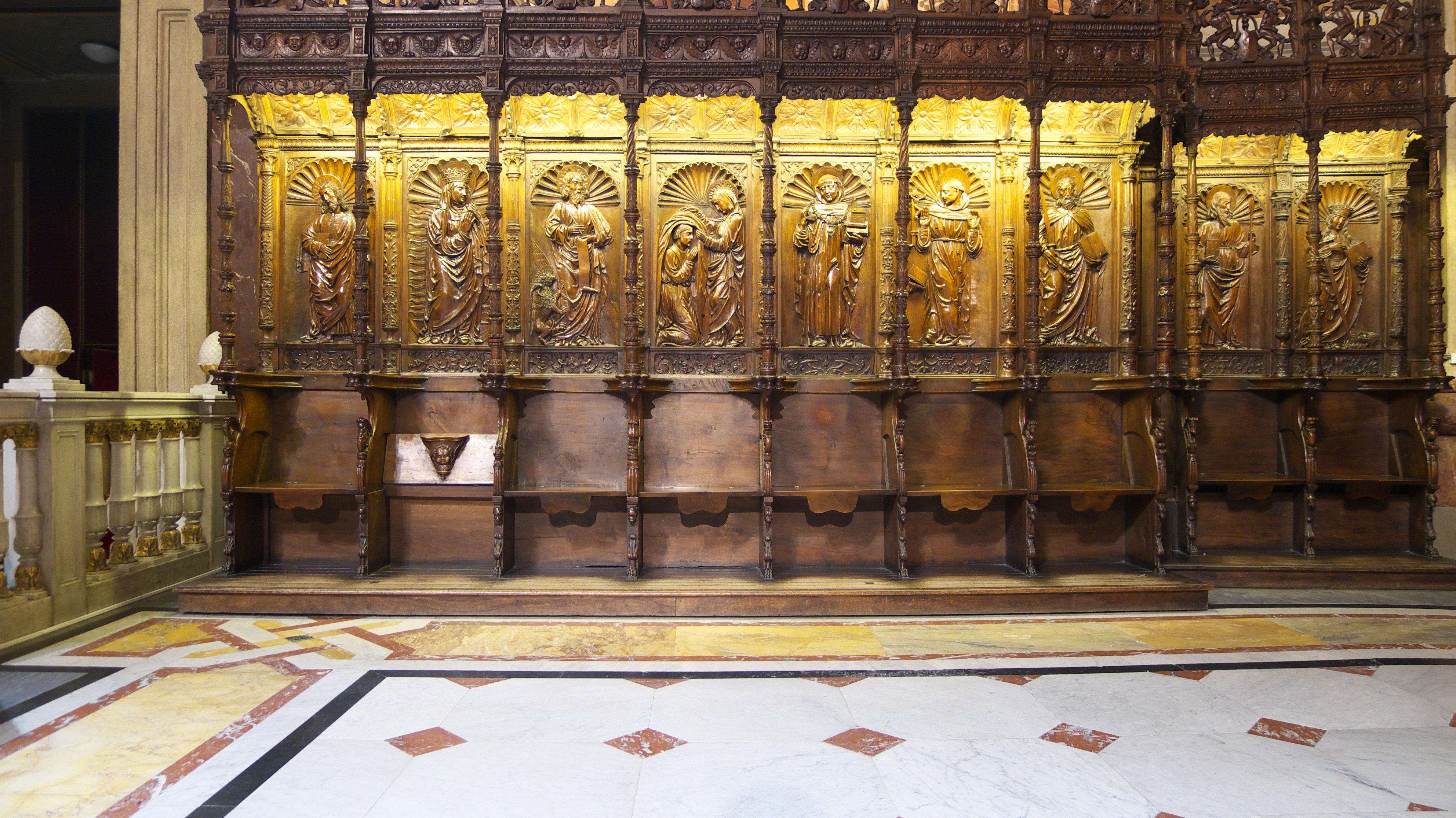 Real Basílica de San Francisco el Grande (Madrid). Parte de la sillería baja del Real Monasterio de Santa María del Parral. Localizada "accidentalmente" en la Basílica de San Francisco el Grande (Madrid), tal vez, en espera de volver al monasterio. La magnífica obra pertenece al escultor segoviano Bartolomé Fernández, que la culmina entre los años de 1526 al 1530.